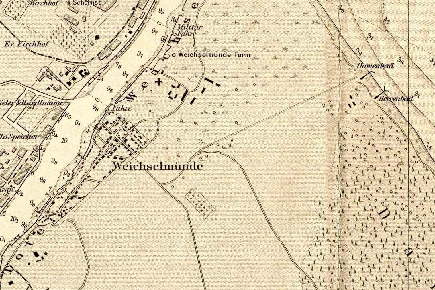 Gdańsk Wisłoujście.